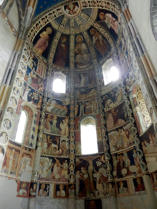 Como - Affreschi trecenteschi all'interno della Basilica di S. Abbondio